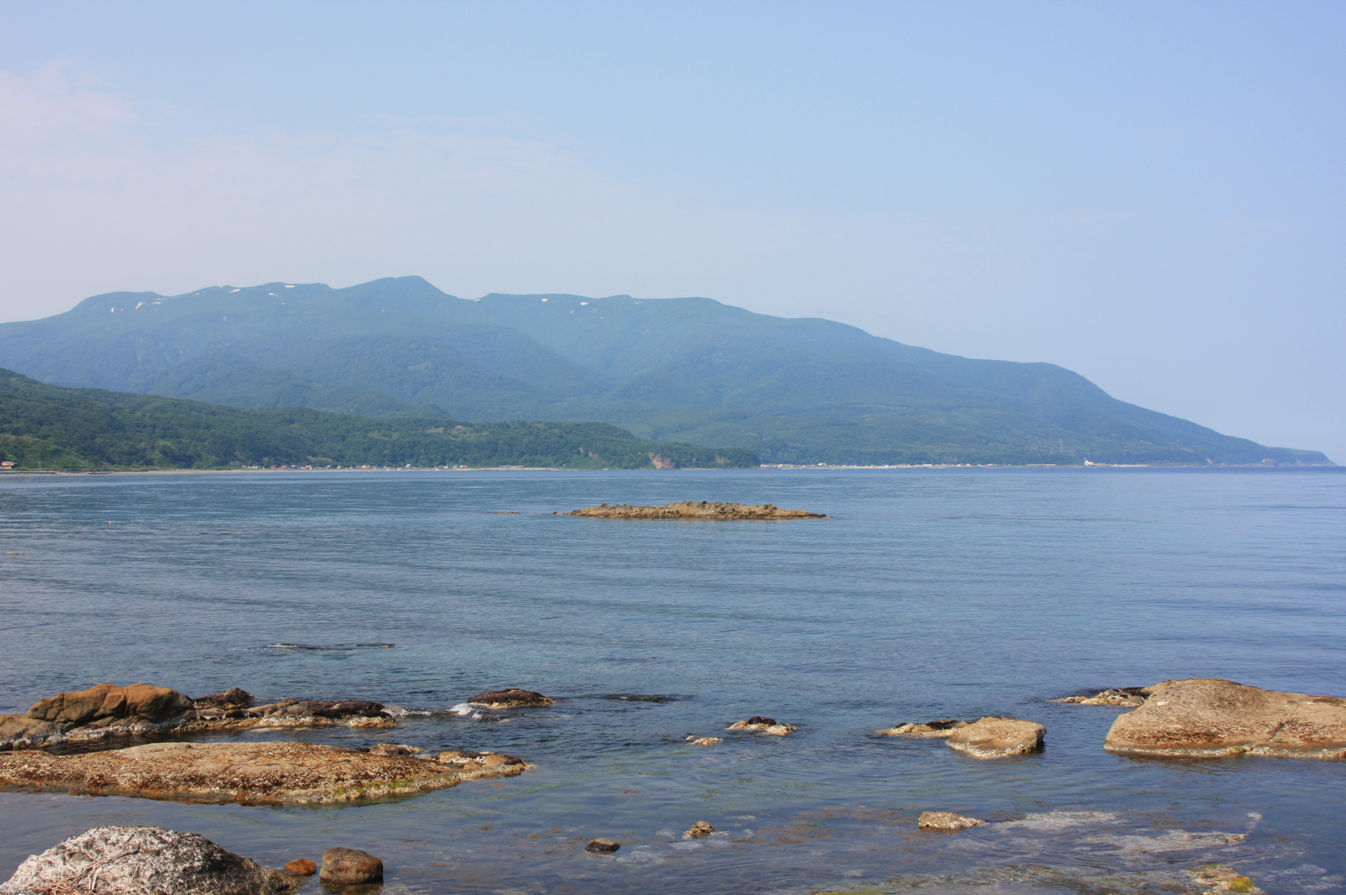 島牧村から望む狩場山